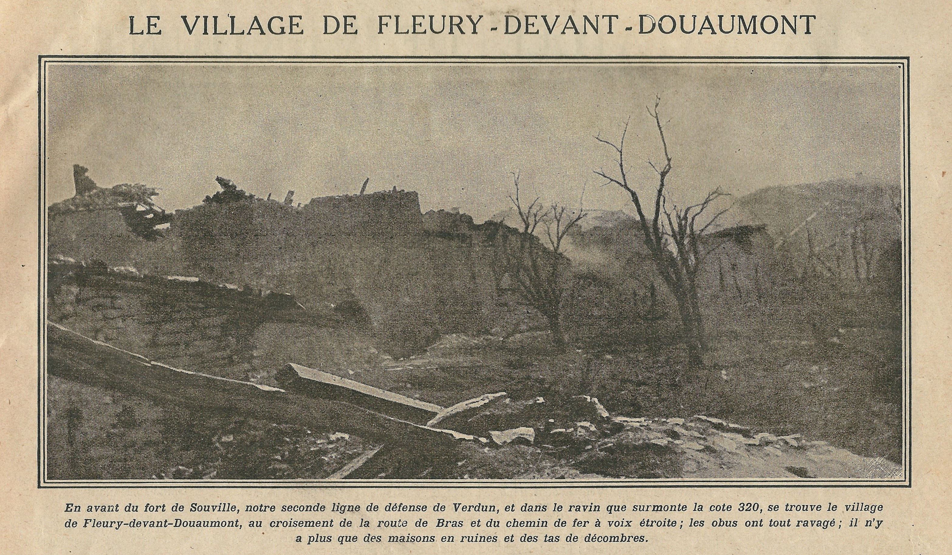 Fleury-devant-Douaumont (Meuse, France) ; le village ravagé par les combats de Juin 1916